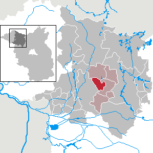 Walsleben in Brandenburg (Country) - District Ostprignitz-Ruppin